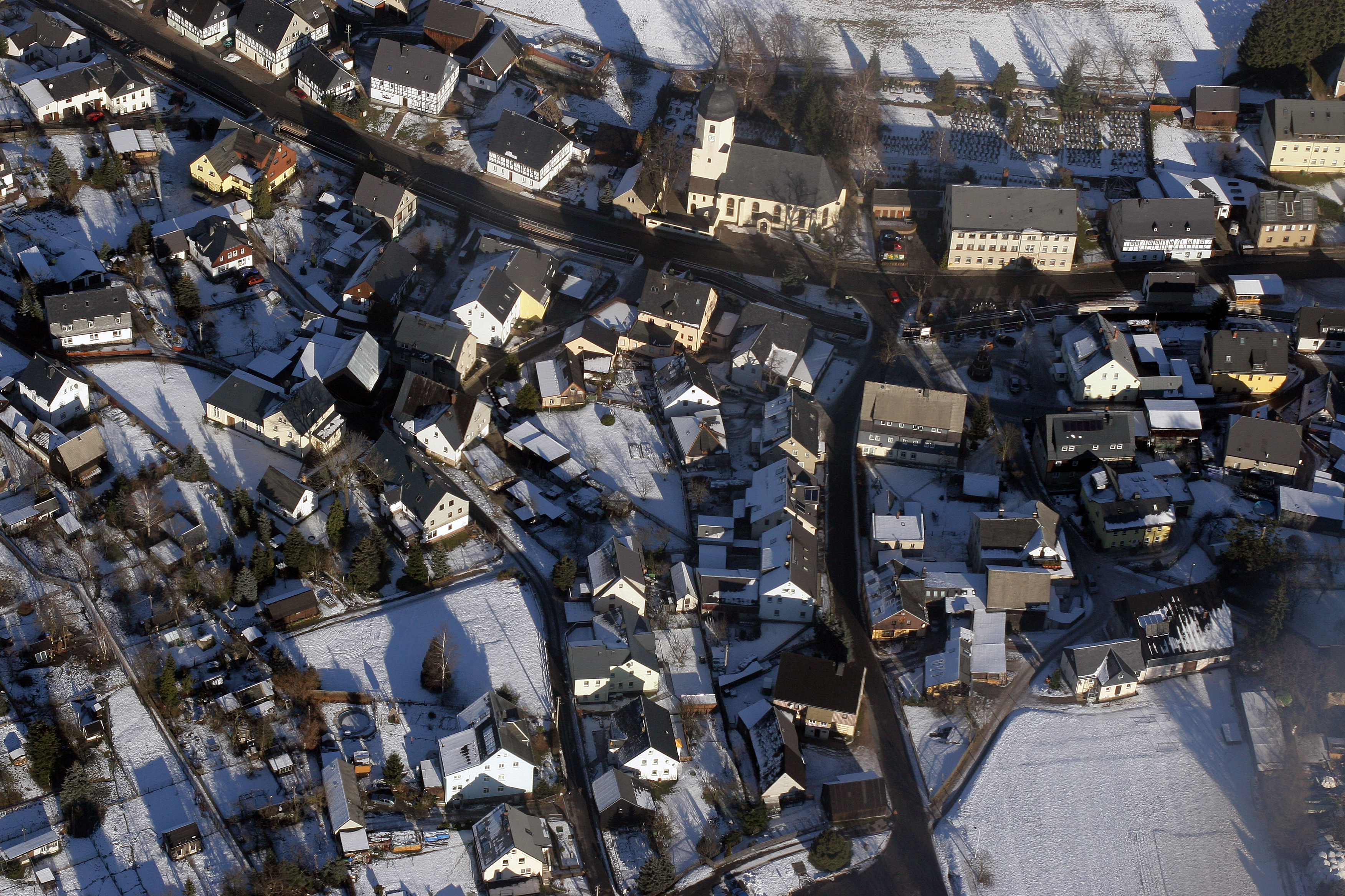 Sosa Luftaufnahme